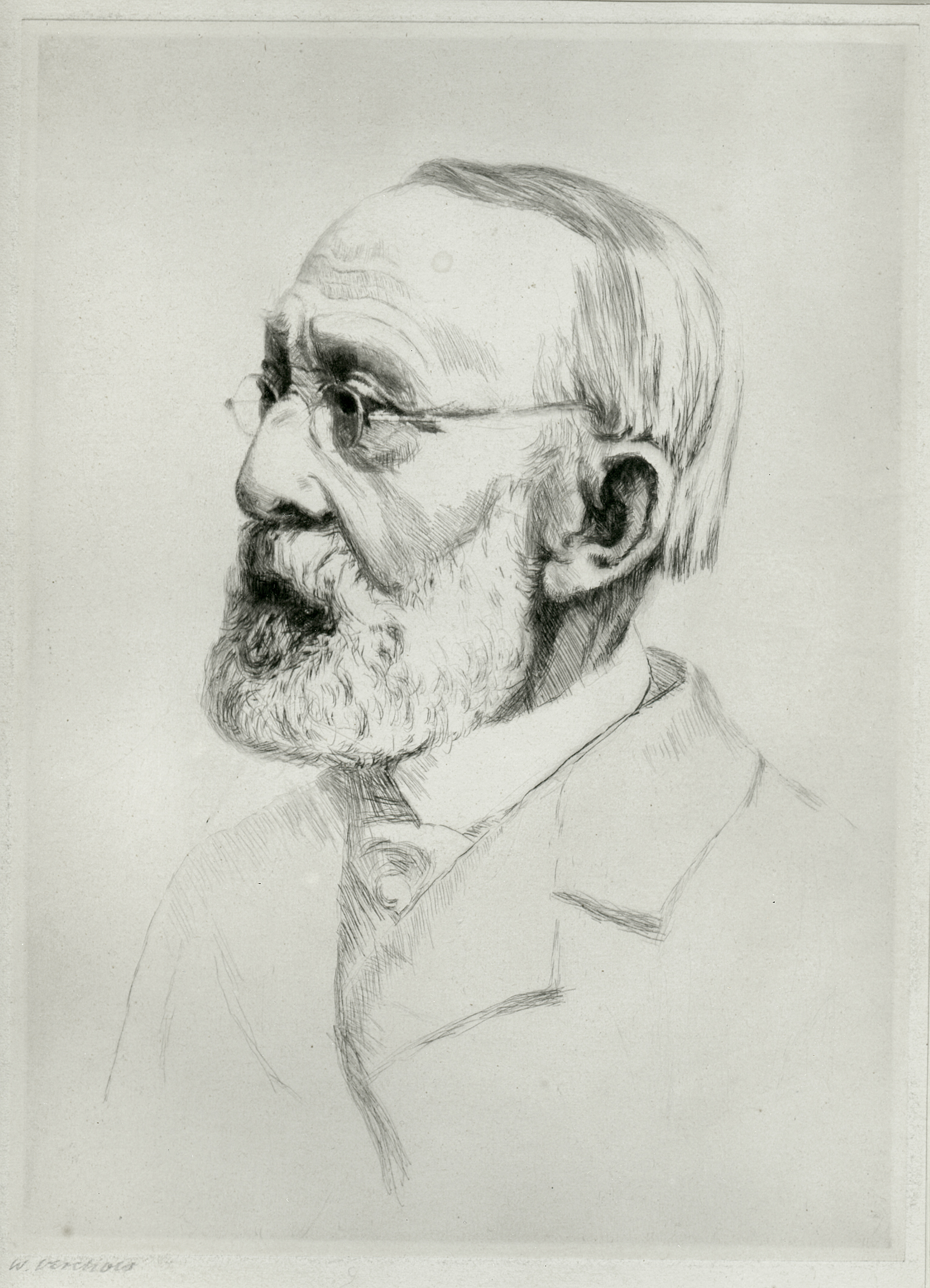 Rudolf Virchow, Portrait. Kaltnadelradierung um 1900 aus dem Haushalt von Dr. Konrad Hahm, Schenkung an das ehemalige Museum für Deutsche Volkskunde in Berlin/West durch Hendrik Hahm.jpg